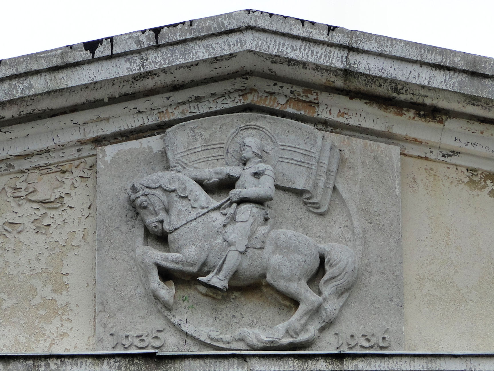 Borne Sulinowo